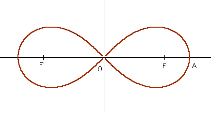 Lemniscate de Bernoulli Dessin réalisé par mes soins avec WinPlot. Cham 15 oct 2004 à 16:21 (CEST)